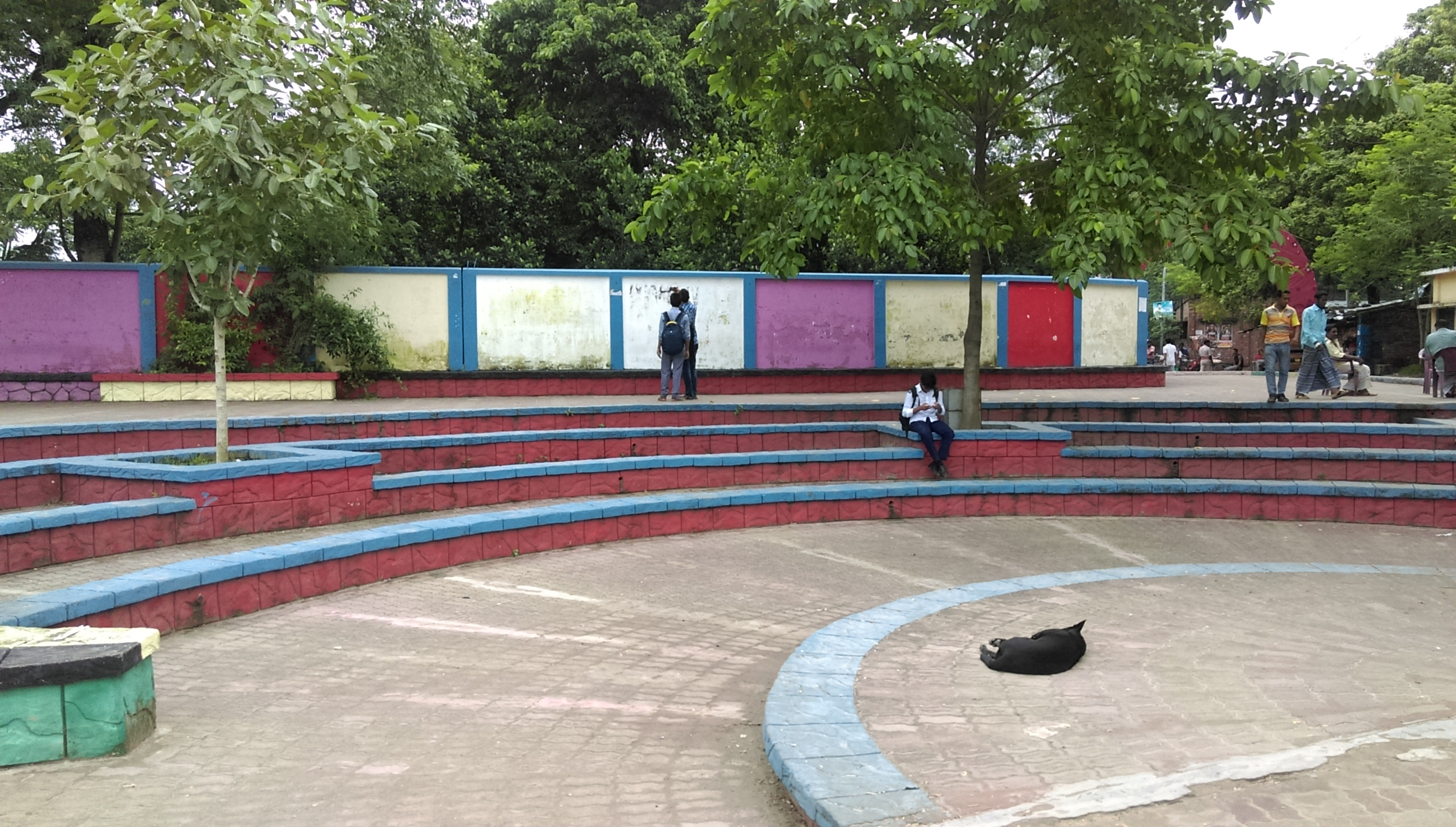 Oddvar munksgaard park